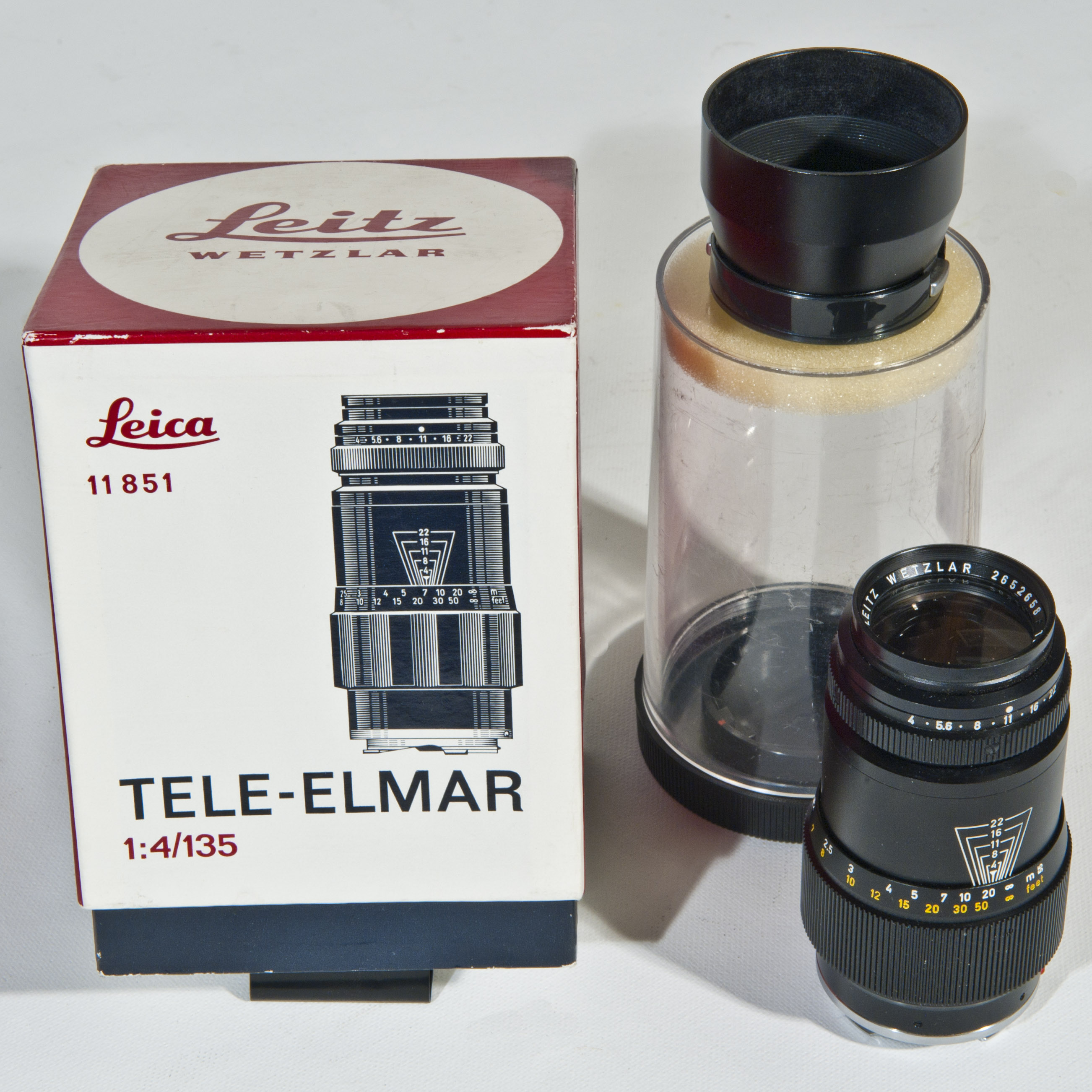 Leitz/Leica Tele-Elmar 135 mm